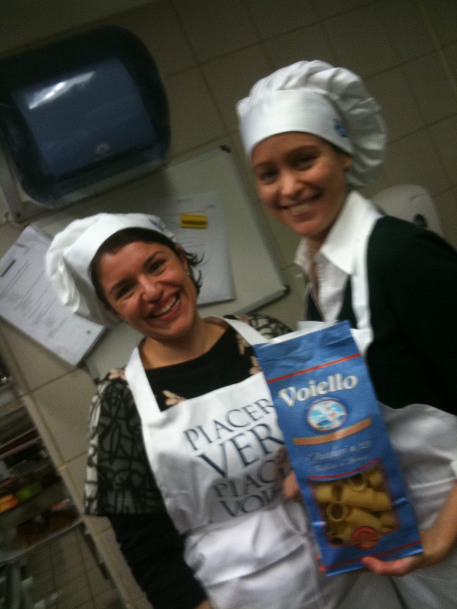 donne in cucina